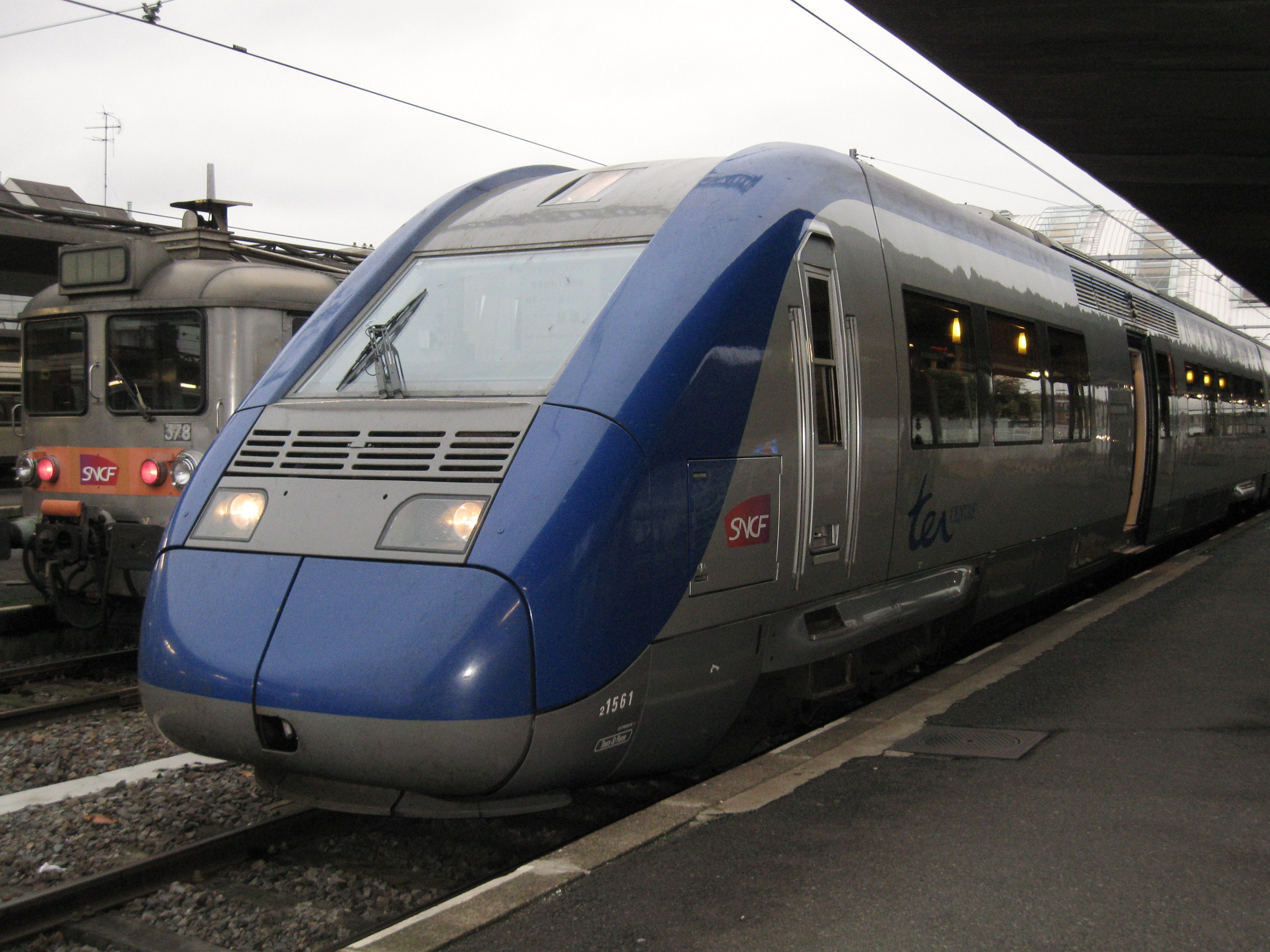 Automotrice Z 21561 (TER Centre), en gare d'Orléans, Loiret, France